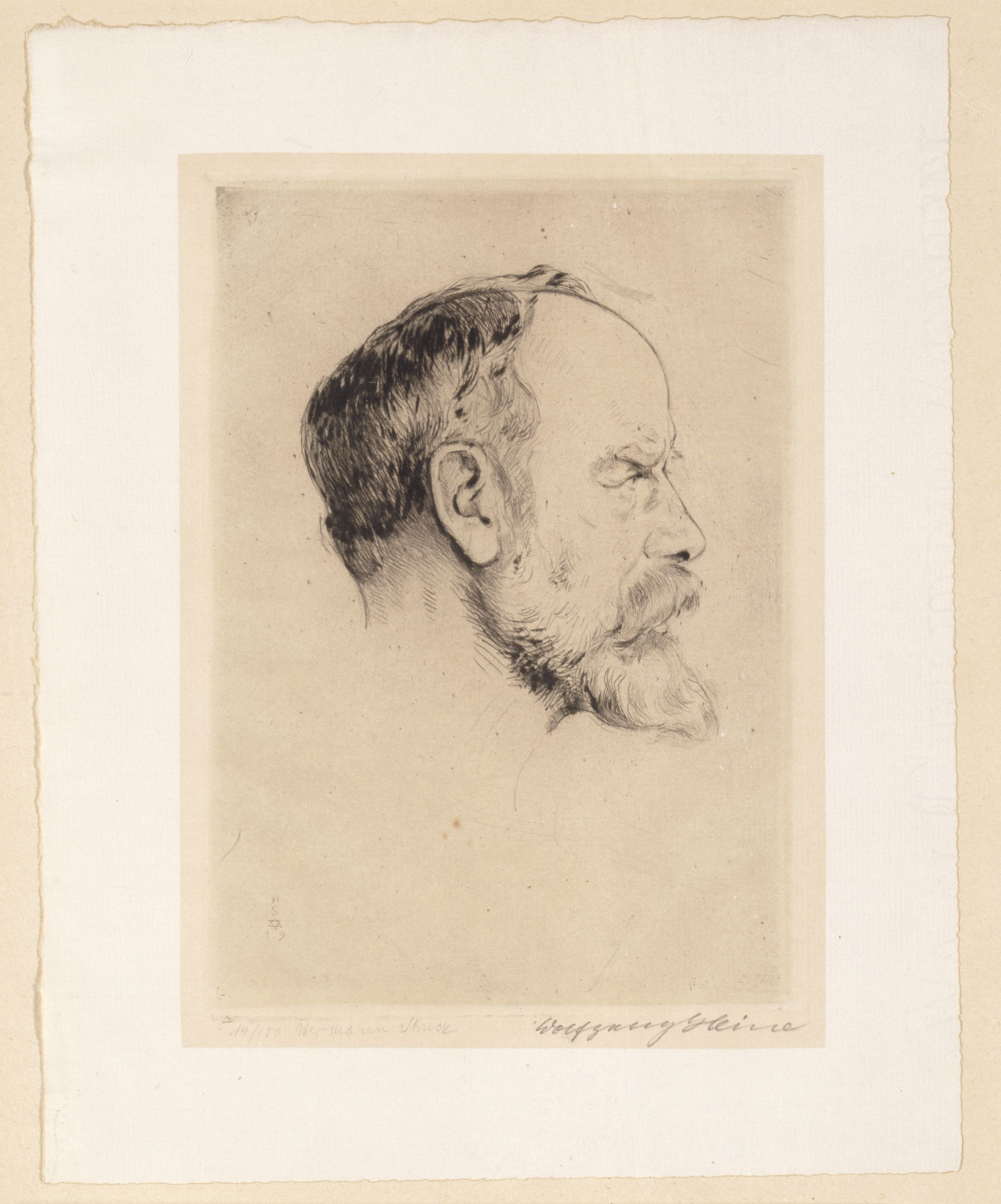 Artwork by Hermann Struck Dargestellte Person: Heine, Wolfgang (3.5.1861 - 9.5.1944), DNB-Link Datierung Display: 1919 Objektart: Radierung Schlagworte Inhalt /Geografie: Mann, Porträt Schlagworte Kontext: Jurist, Politiker